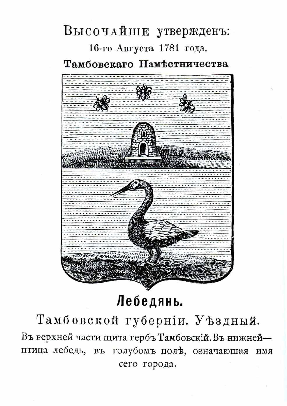 Official Russian Empire coat of arms Lebedyan. Т.н. гласный герб Российской Империи уездного города Лебедянь Тамбовской губернии с официальным описанием в Гербовнике Винклера.